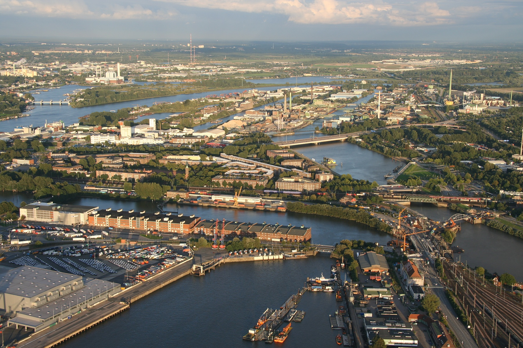 Vordergrund: Hansahafen, Saalehafen - Bildmitte: Peute